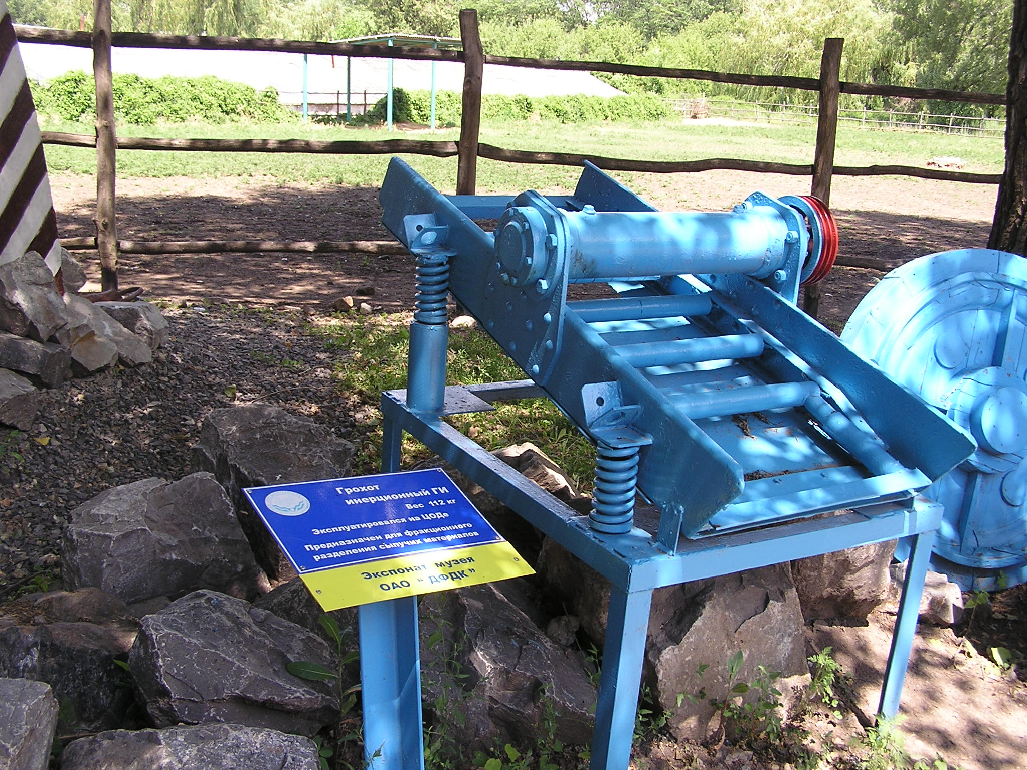 Музей ОАО "Докучаевский флюсо-доломитный комбинат". Грохот инерционный ГИ. Используется для фракционного разделения сыпучих материалов